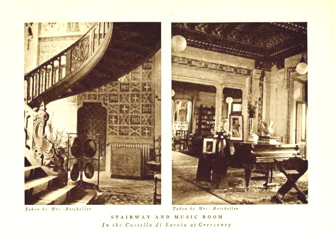 Illustration aus " Italian castles and coutry seats "